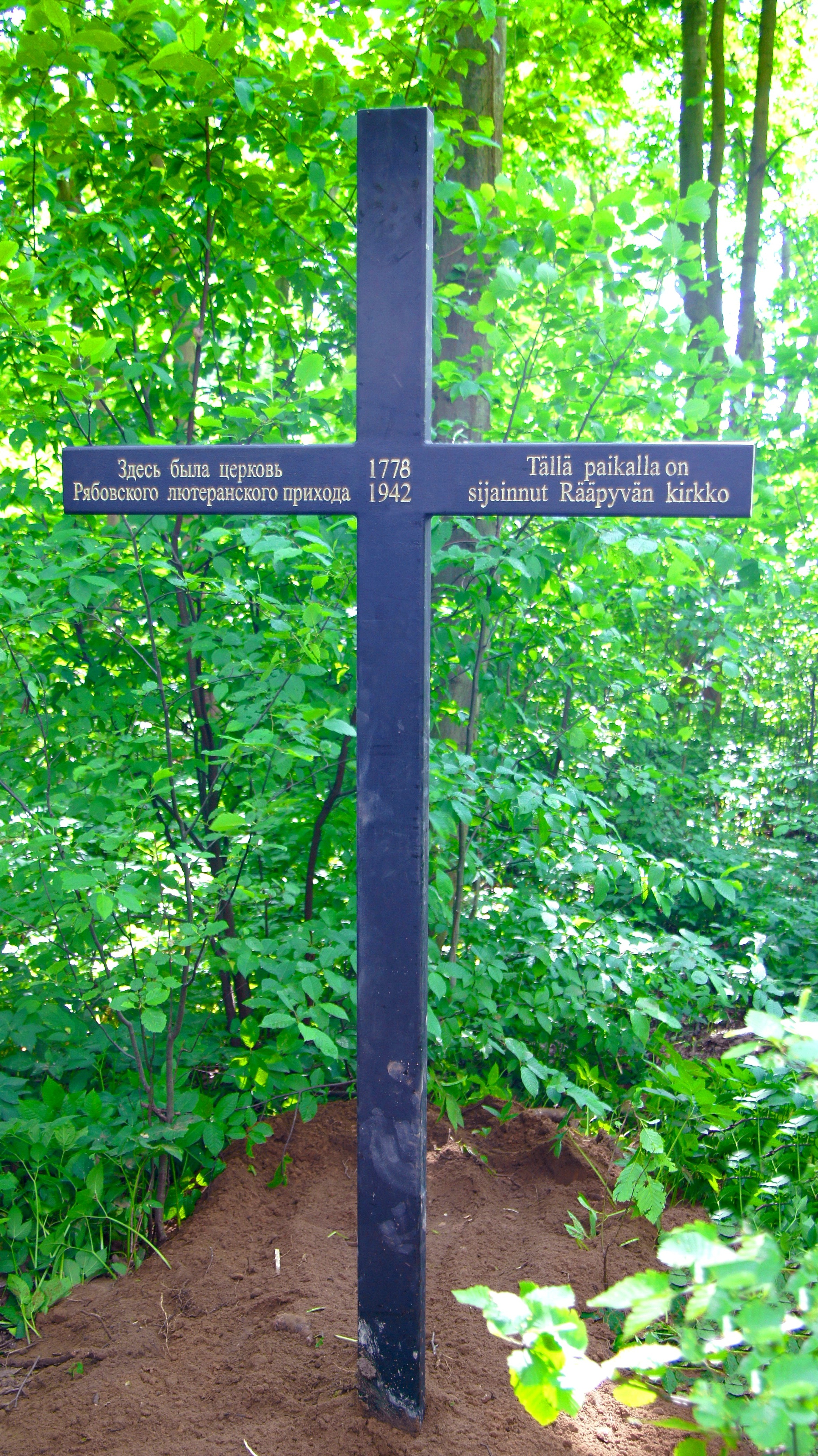 Всеволожск. Памятный крест на месте кирхи святой Регины Рябовского лютеранского прихода.